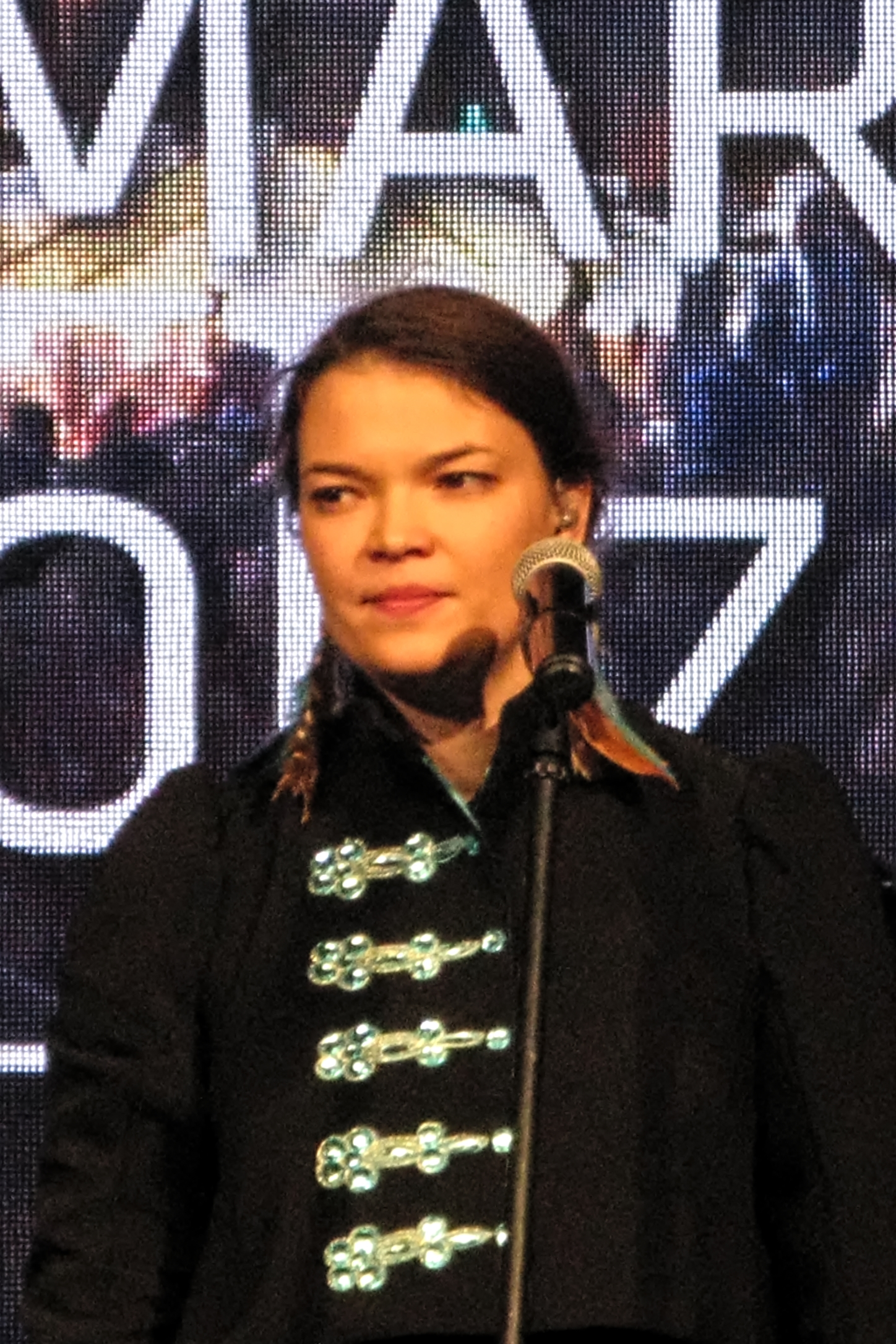 Katarzyna Dudziak podczas koncertu zespołu Krzikopa na katowickim rynku, darmowa plenerowa impreza ze wstępem wolnym towarzysząca Jarmarkom Śląskim (Jarmark Bożonarodzeniowy 2018 w Katowicach)